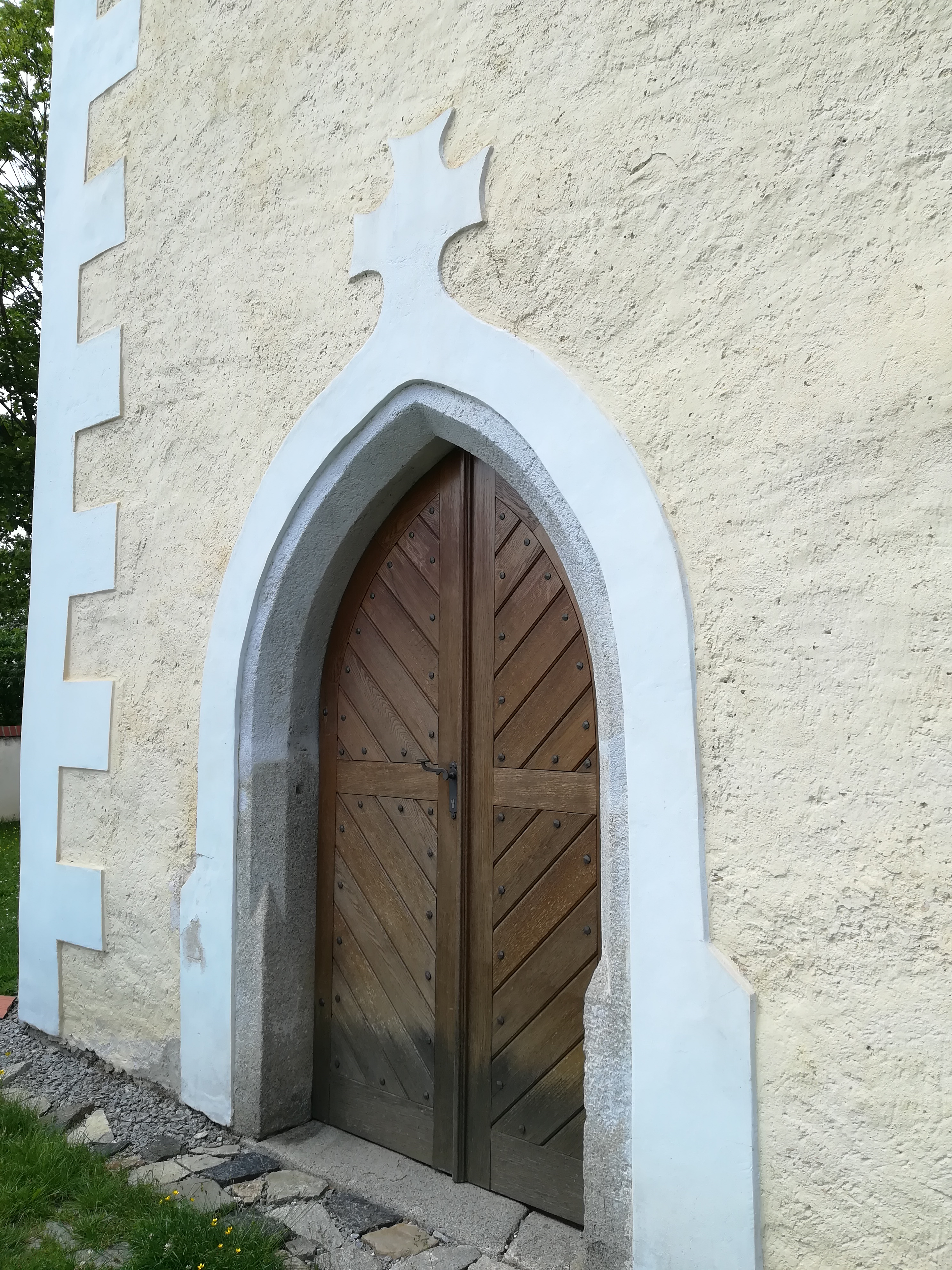 gotický portál mladošovického kostela